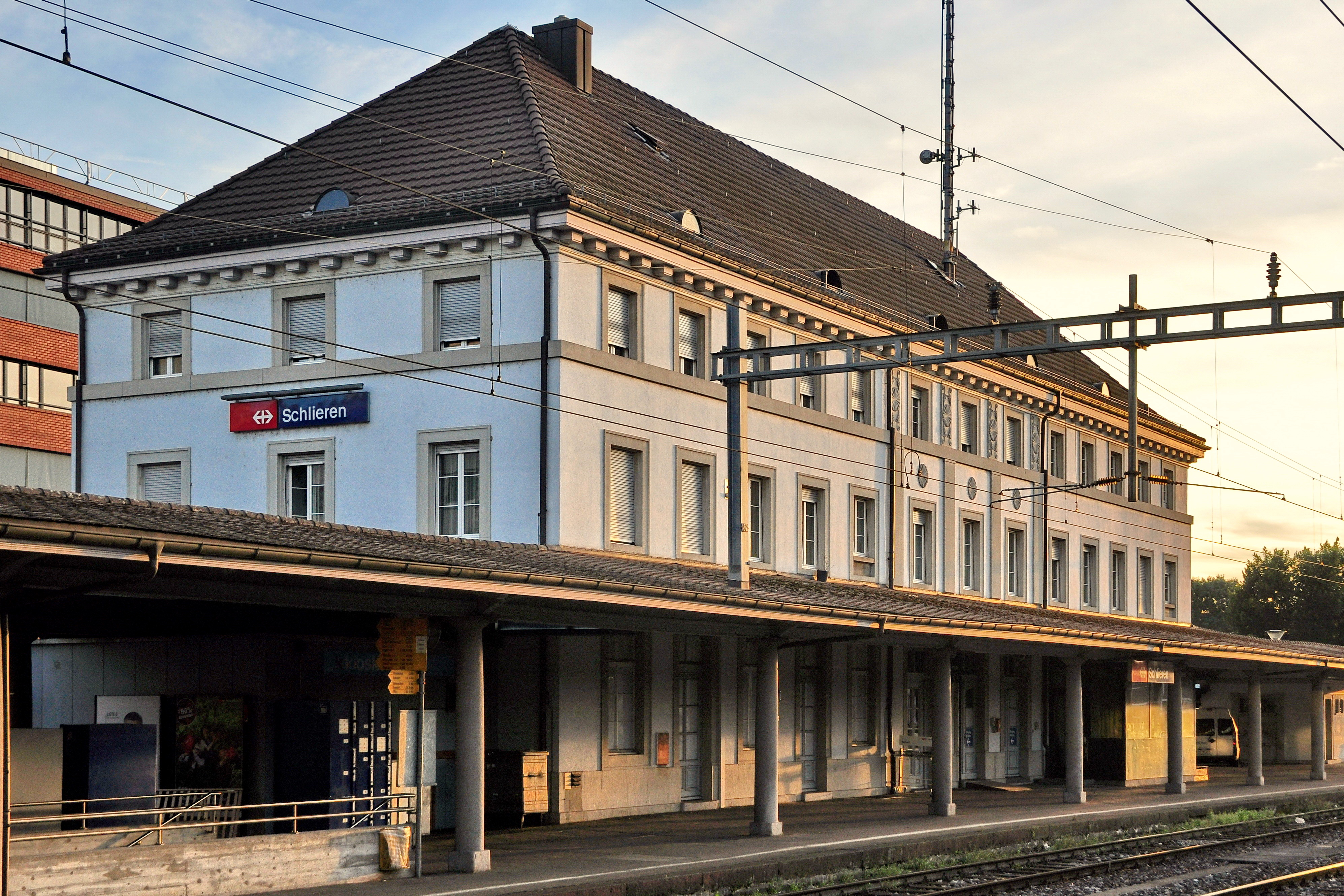 Bahnhof in Schlieren (Switzerland)